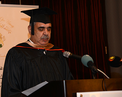 د. ازاد الشكرجي